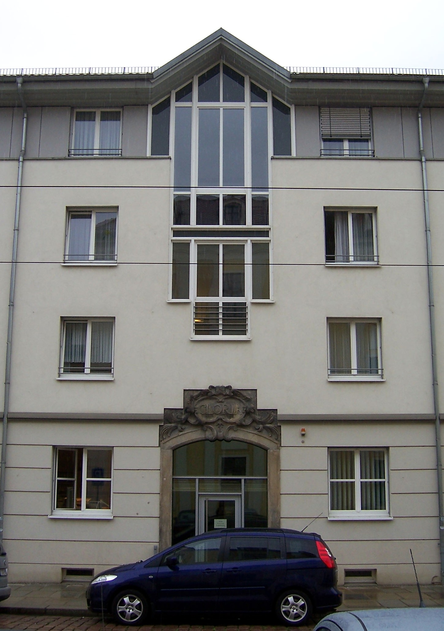 Neubau an der Stelle des Esseniusschen Hauses in der Dresdner Friedrichstadt mit Barockportal.